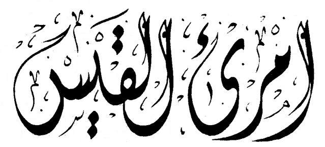 Calligraphie du nom du poète arabe préislamique Imrou'l Qays